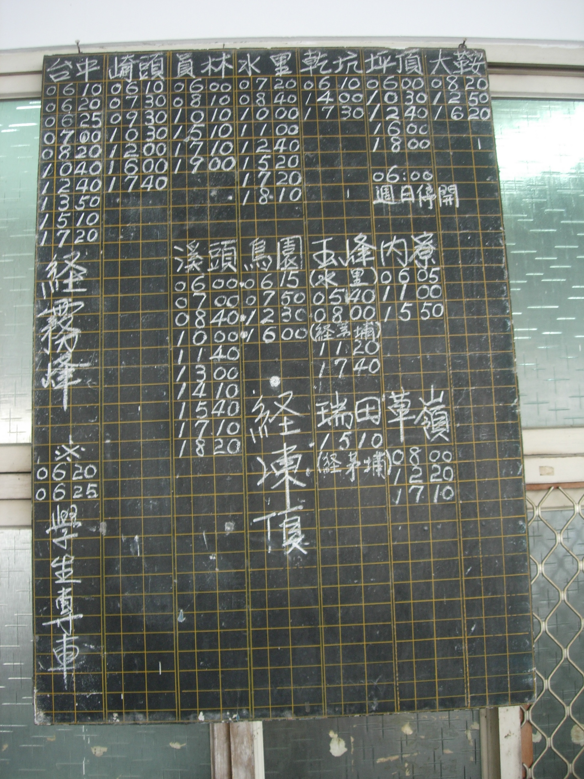 中文（台灣）: 員林客運竹山站月台時刻表